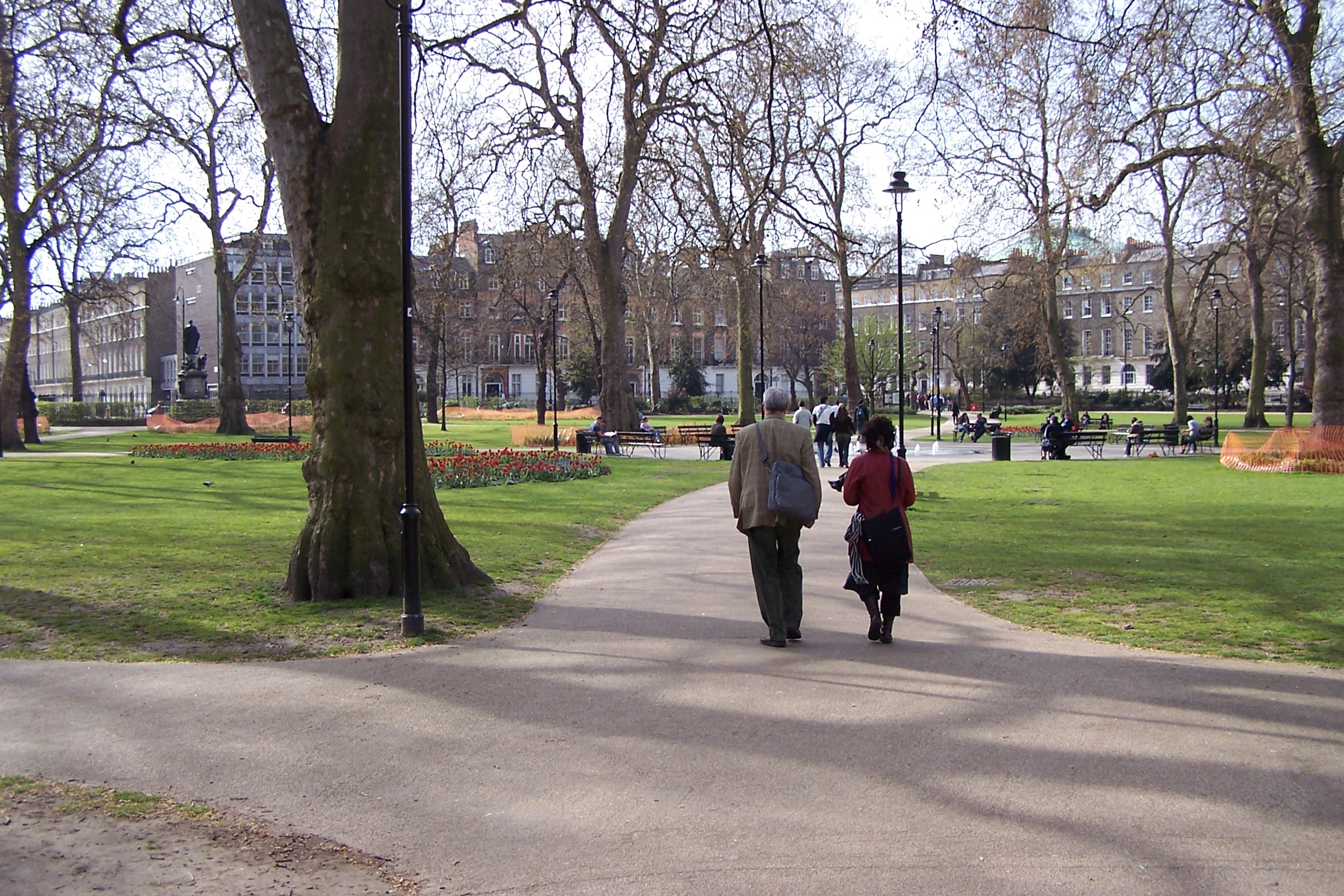 Russell Square in London